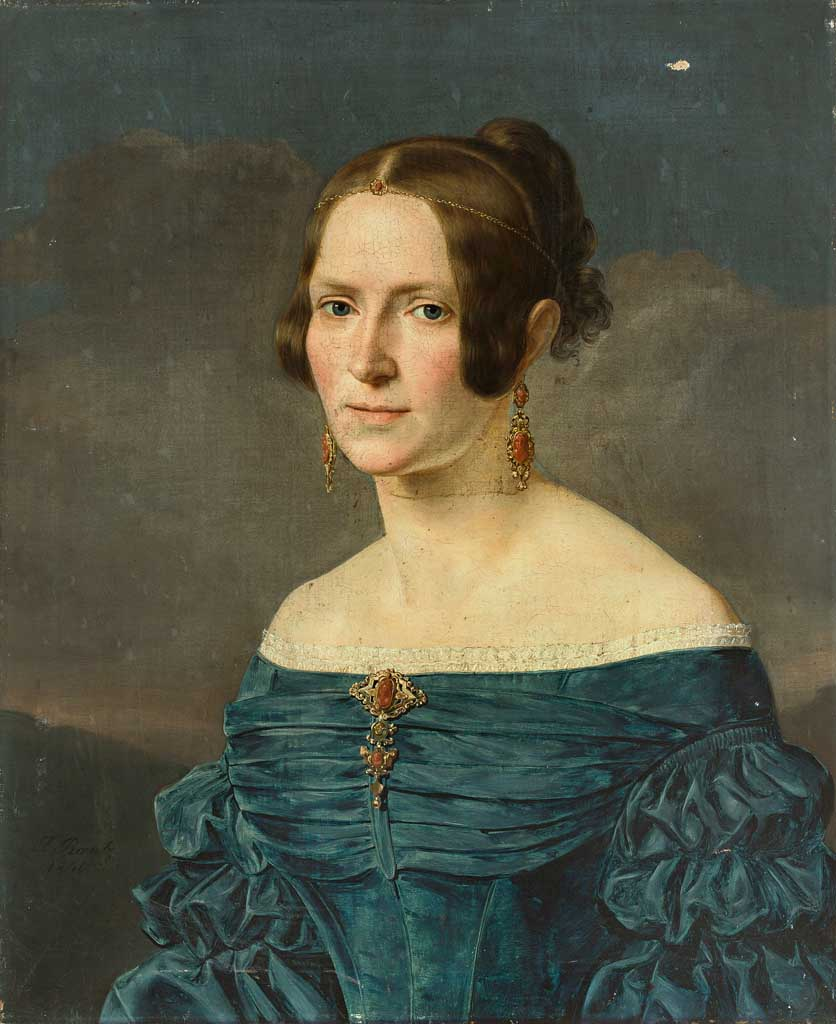 Damenporträt, signiert und 1840 datiert. Öl auf Leinwand 63,8 x 52 cm